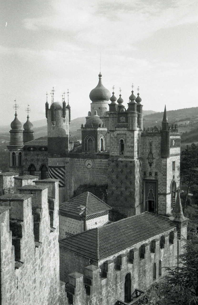 Servizio fotografico : Grizzana Morandi, 1969 / Paolo Monti. - Strisce: 7, Fotogrammi complessivi: 37 : Negativo b/n, gelatina bromuro d'argento/ pellicola ; 35 mm. - ((I fotogrammi hanno una doppia numerazione. . - Sul portanegativi: Leica V Agfa 21. - Sul dorso del portanegativi Monti specifica: "Borgata La Scola. Rocchetta Mattei.". - Occasione: Campagna di rilevamento (seconda)della provincia di Bologna (Soprintendenza per i Beni artistici e storici): Appenino bolognese ed imolese, versante orientale del Reno. - Fonte: Camicia di Soprintendenza per i Beni Artistici e Storici: I. Carteggi/ Bologna (1981/06/29), presso Archivio Paolo Monti